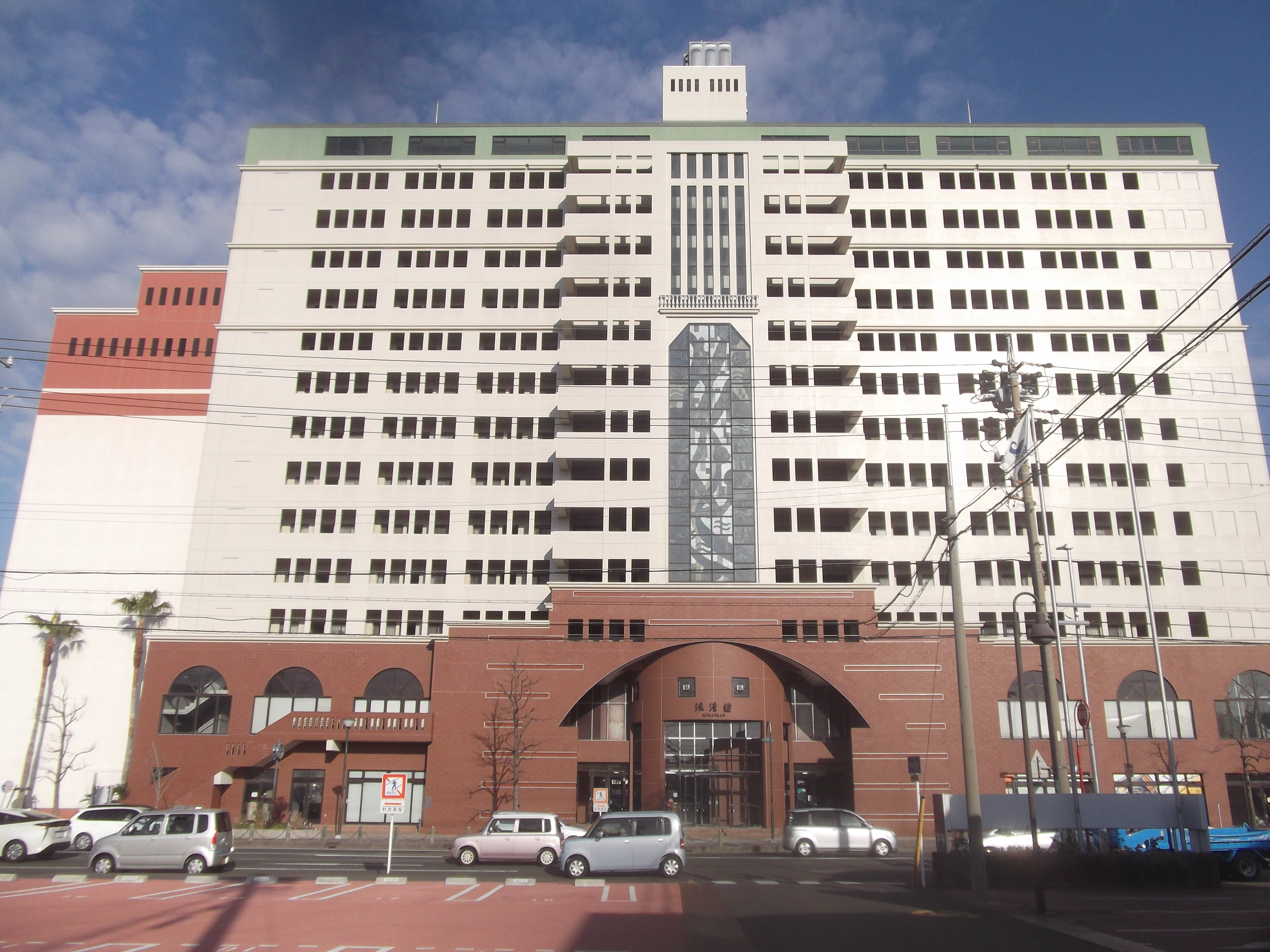 静岡市清水区にある浪漫館（清水マリンビル別館）。商業兼住宅ビル。